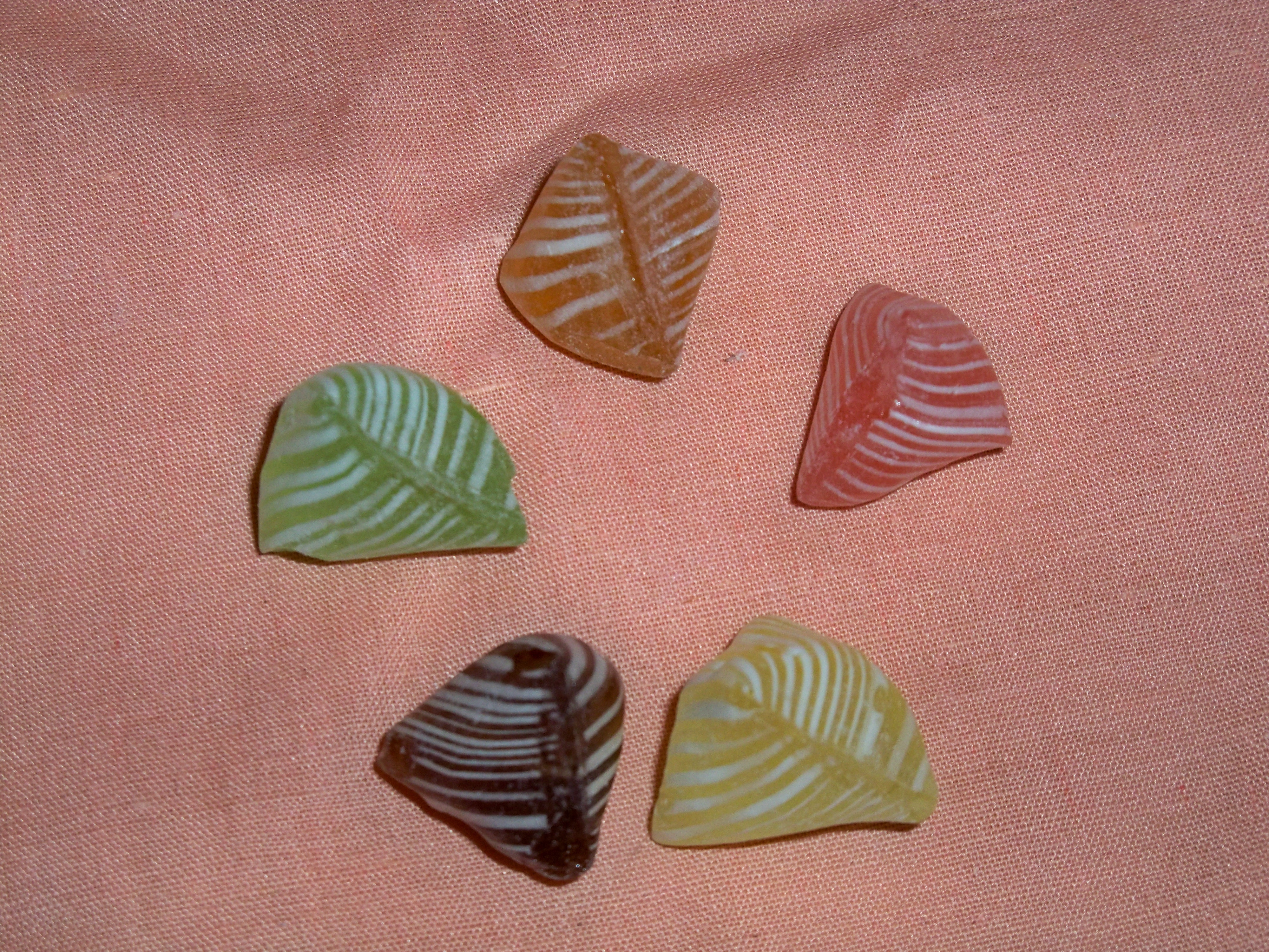 Berlingot de Carpentras : confiserie à base de sirop de fruits confits